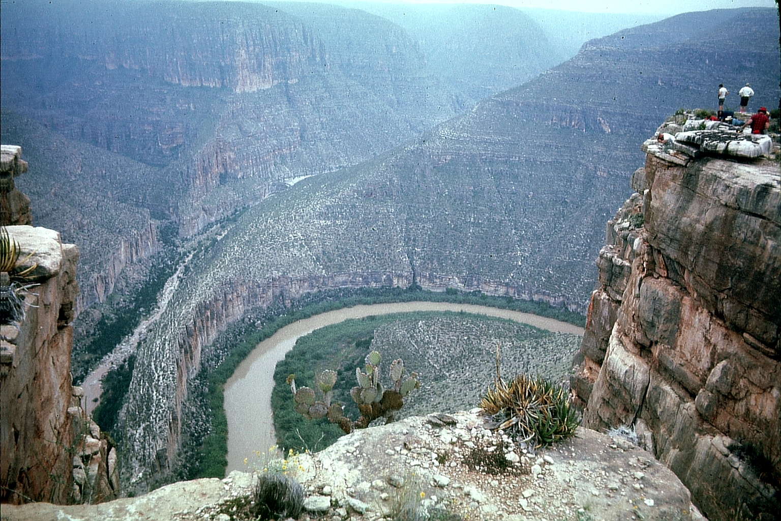 Above Rio Grande from Mexico side